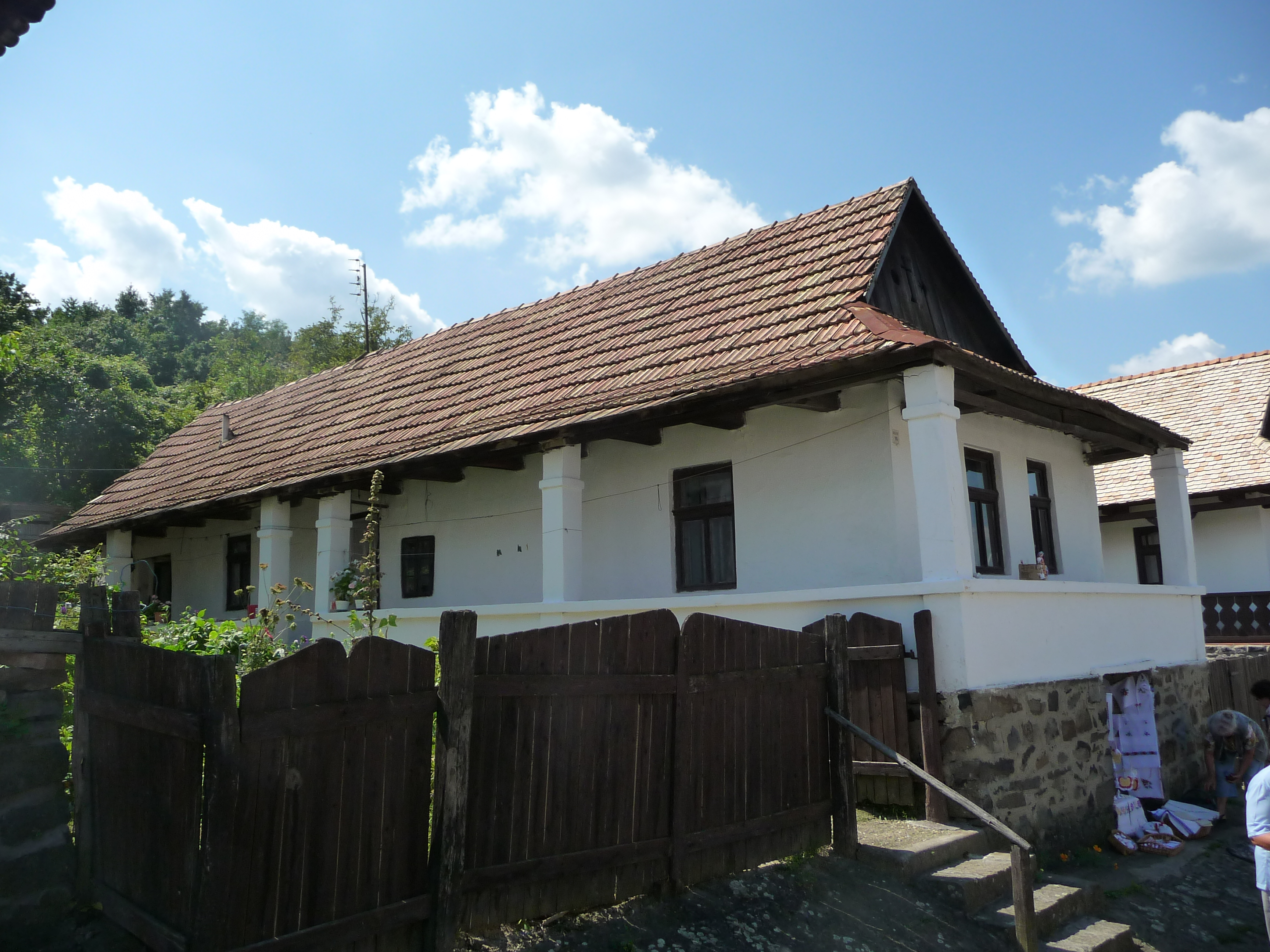 Hollókő, Kossuth L. út 70.